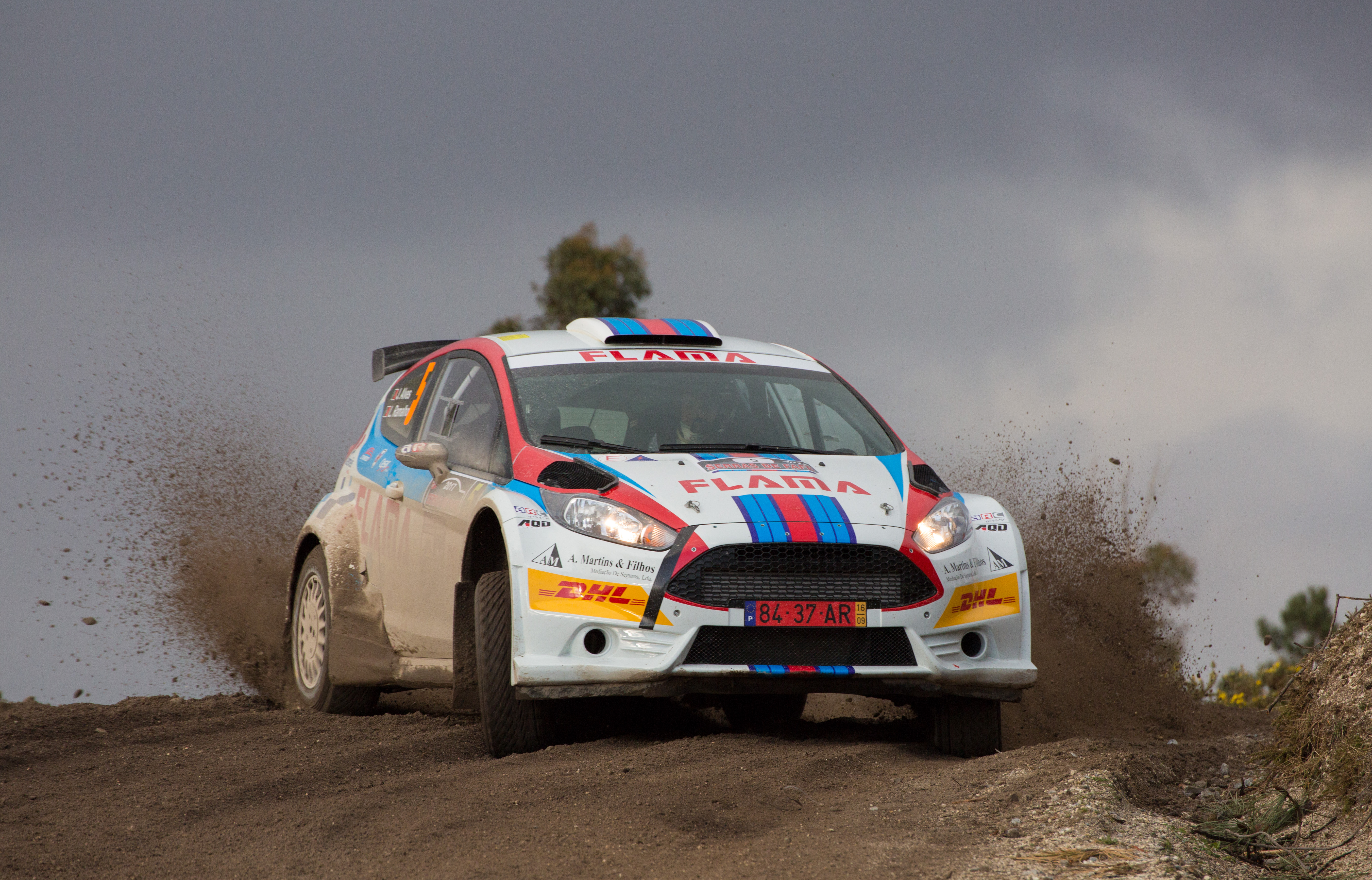 Joaquim Alves con su Ford Fiesta R5 en el Rali Serras de Fafe 2017